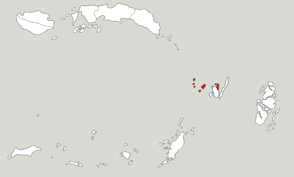 Місто Туал